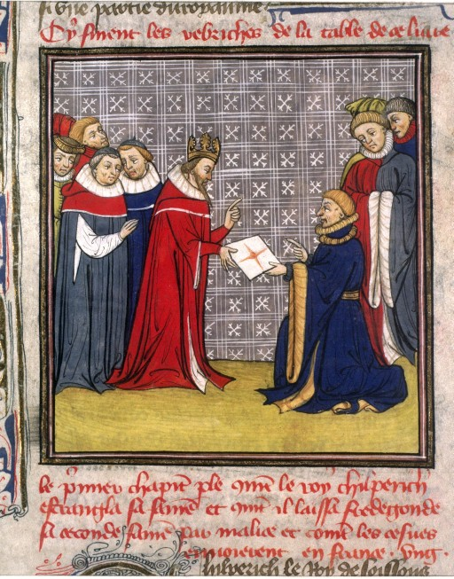 Chilpéric Ier et le(s) messager(s). Français 73, fol. 28v. Grandes chroniques de France. XIVème-XVème siècle.